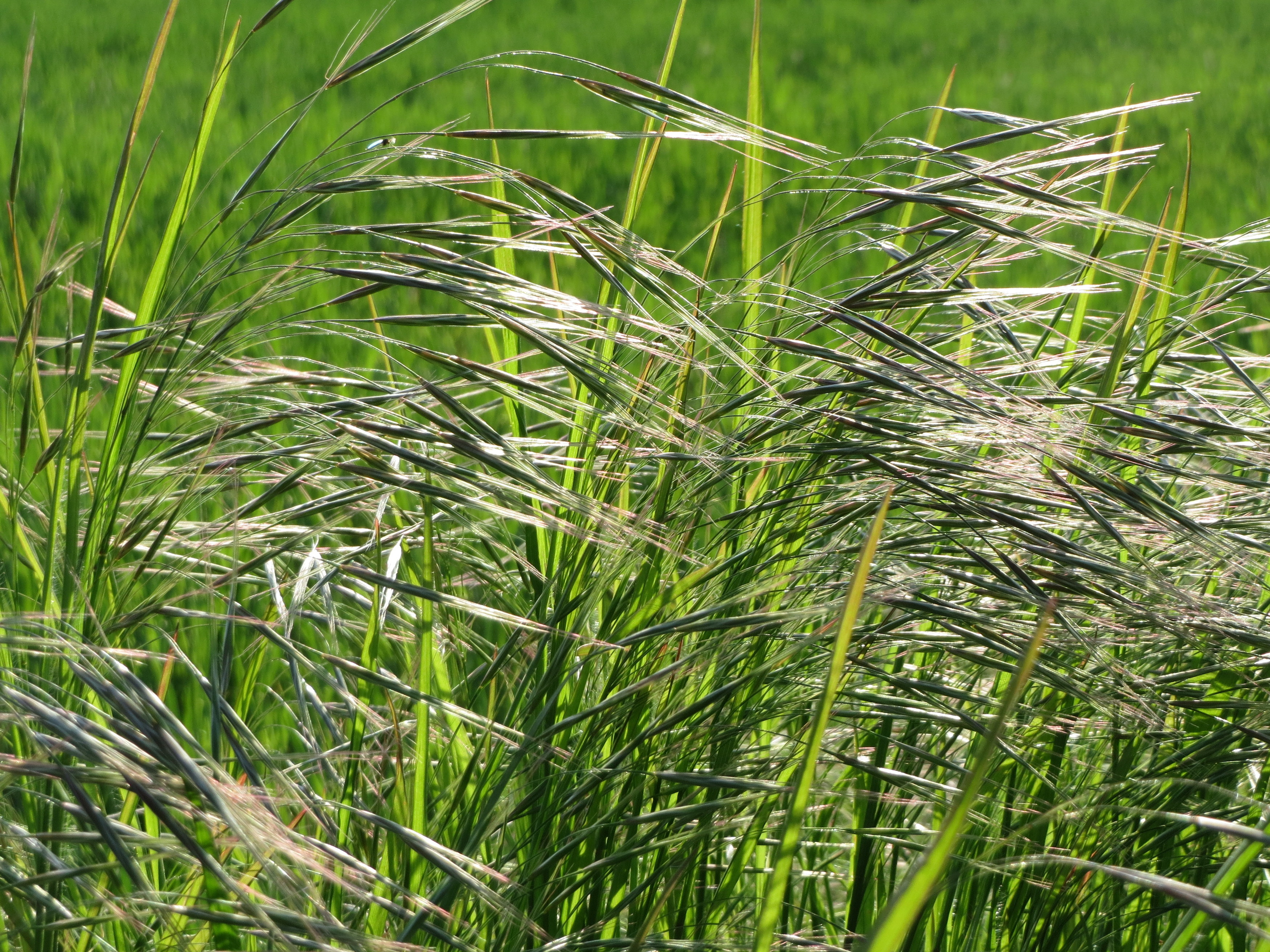 Taube Trespe (Bromus sterilis) in Hockenheim